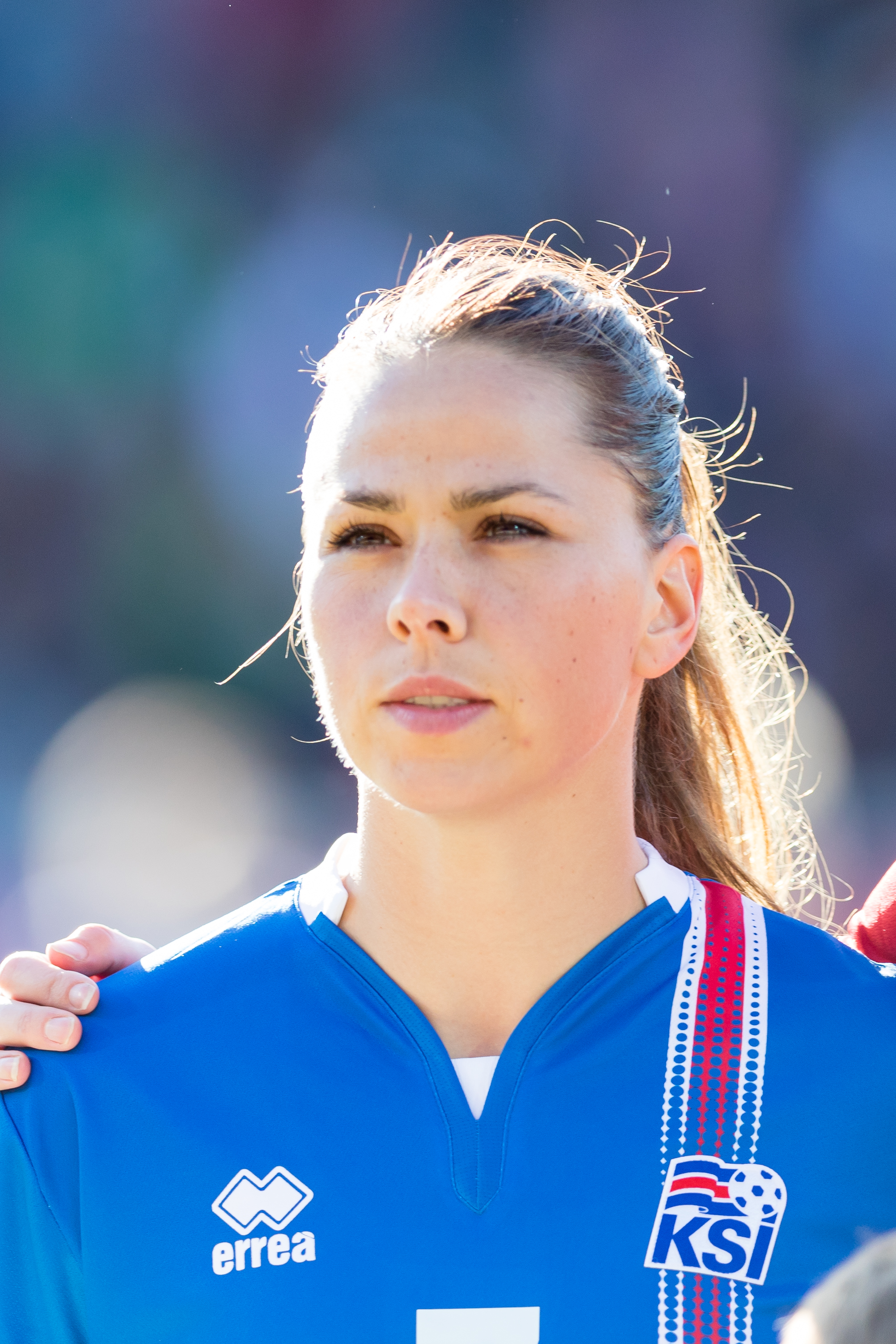 during Fussball Frauen Deutschland vs Island at Brita-Arena, Wiesbaden, Hessen, Germany on 2017-10-20, Photo: Sven Mandel